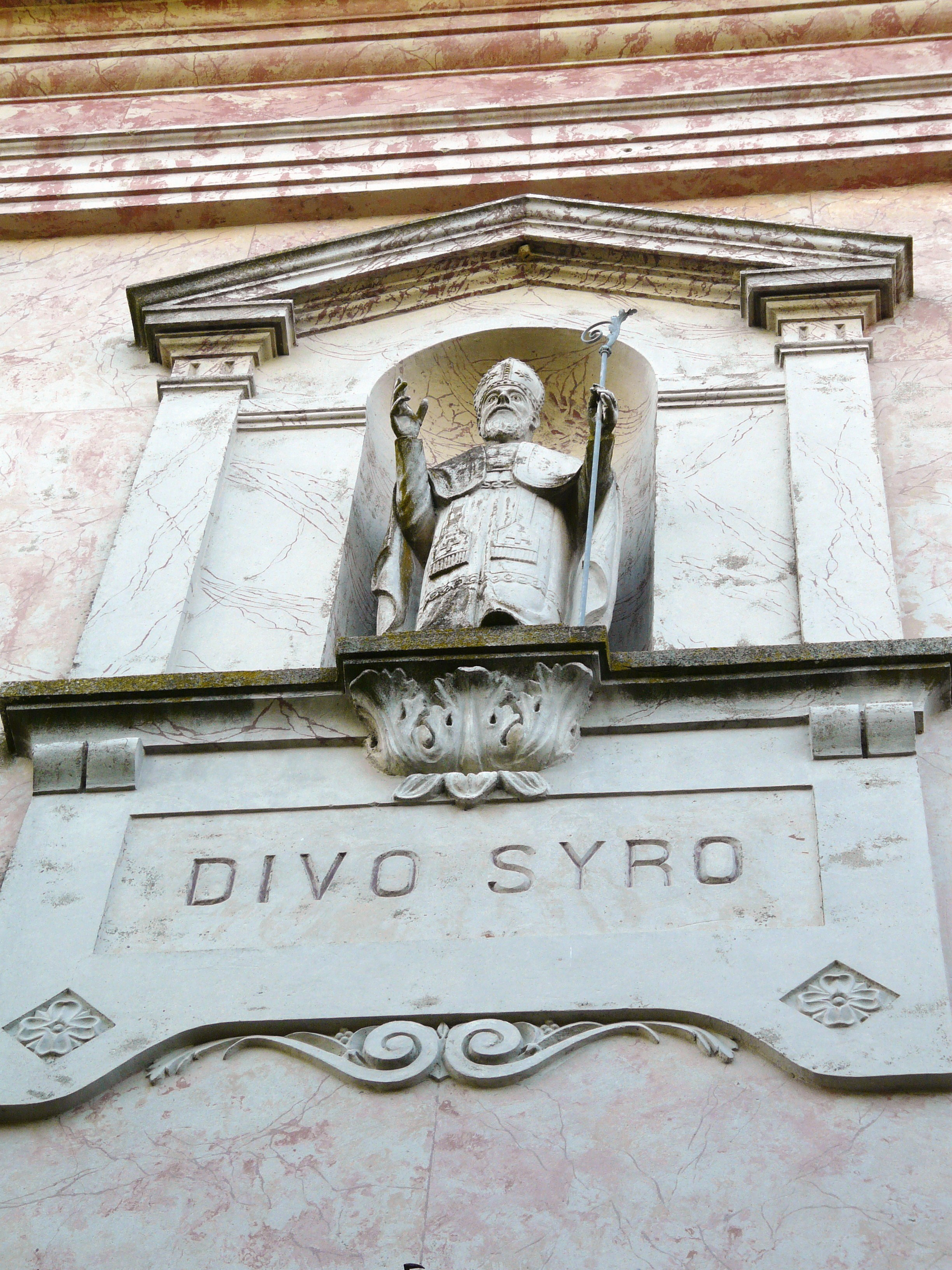 Facciata della chiesa di San Siro, Castelletto Monferrato, Piemonte, Italia